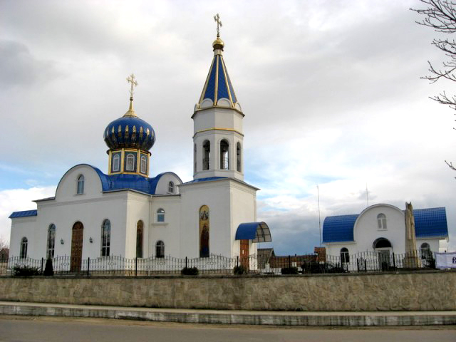 Церковь построена на пожертвования сельчан